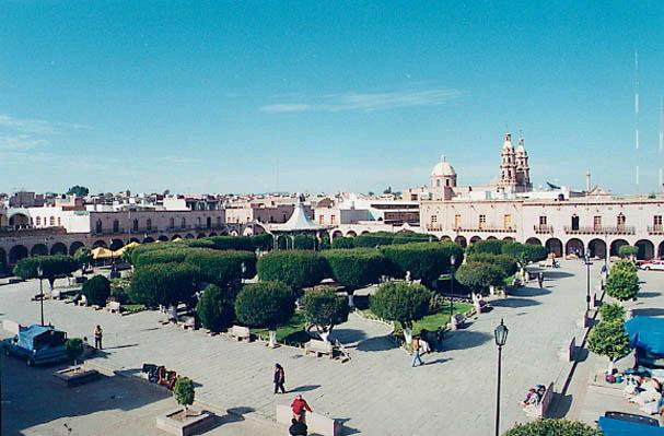 "Plaza de Armas de San Miguel el Alto, Jalisco" - Main square, San Miguel el Alto, Jalisco, Mexico.